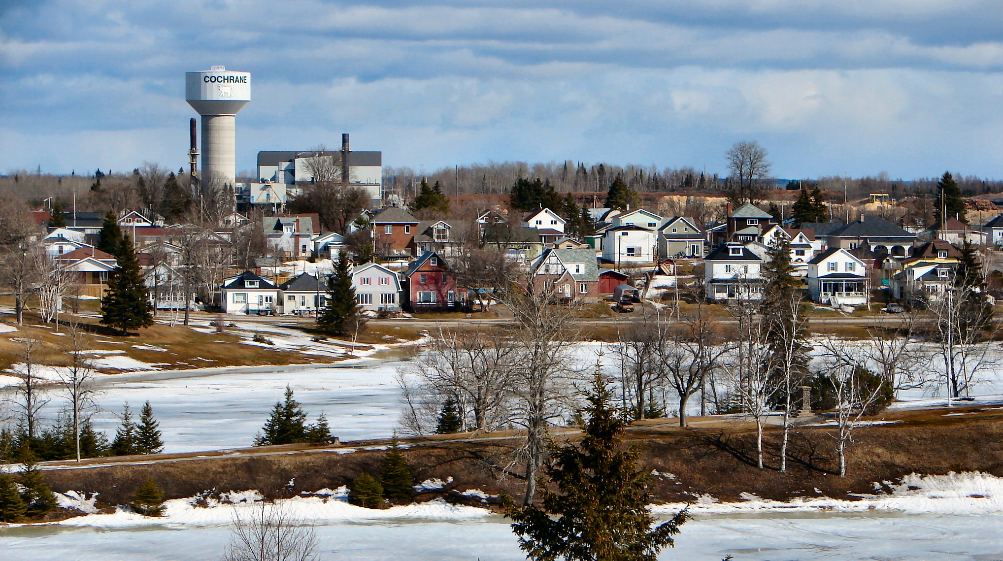 Cochrane, Ontario, Canada